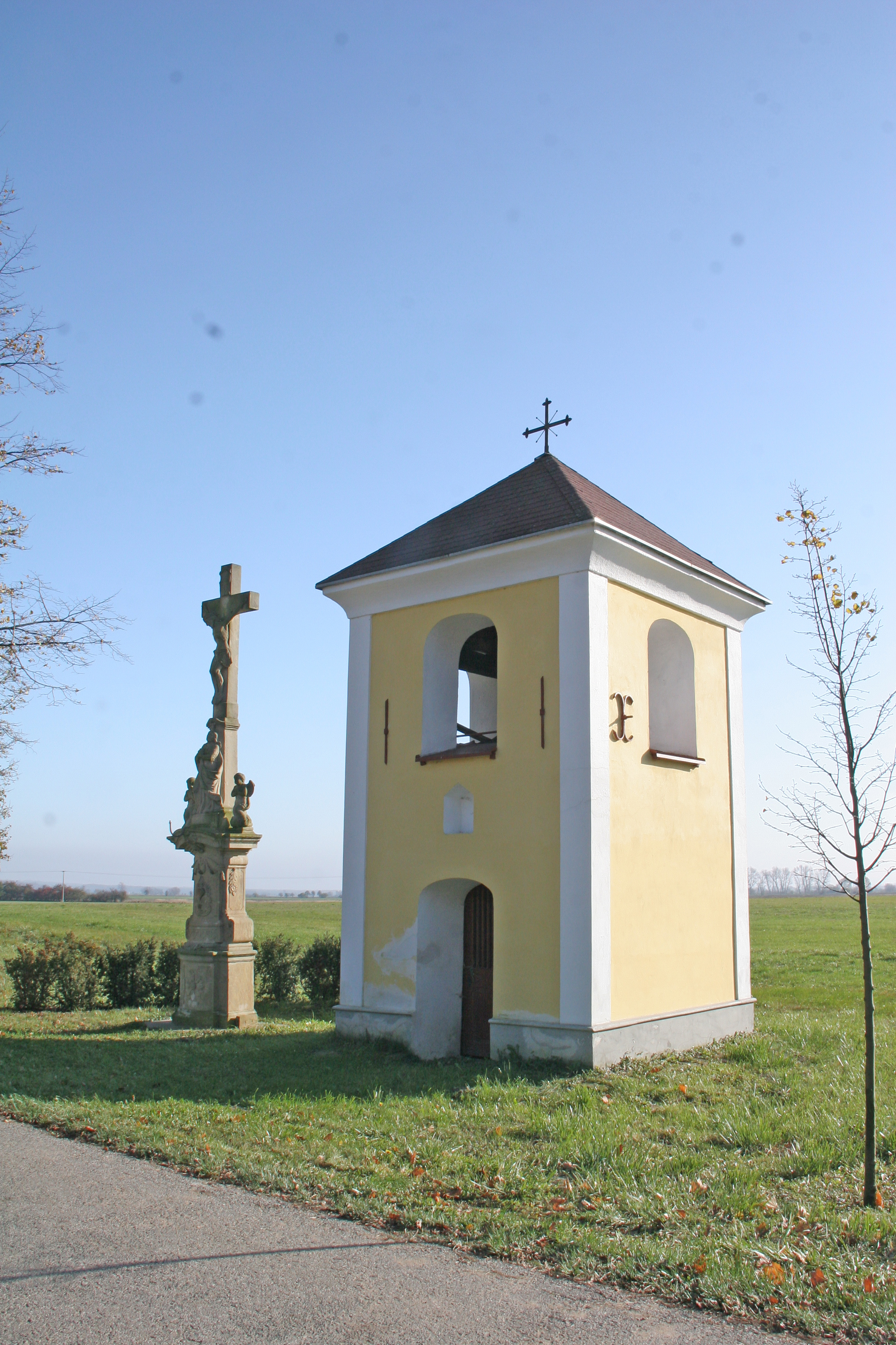 Roveňsko zvonička